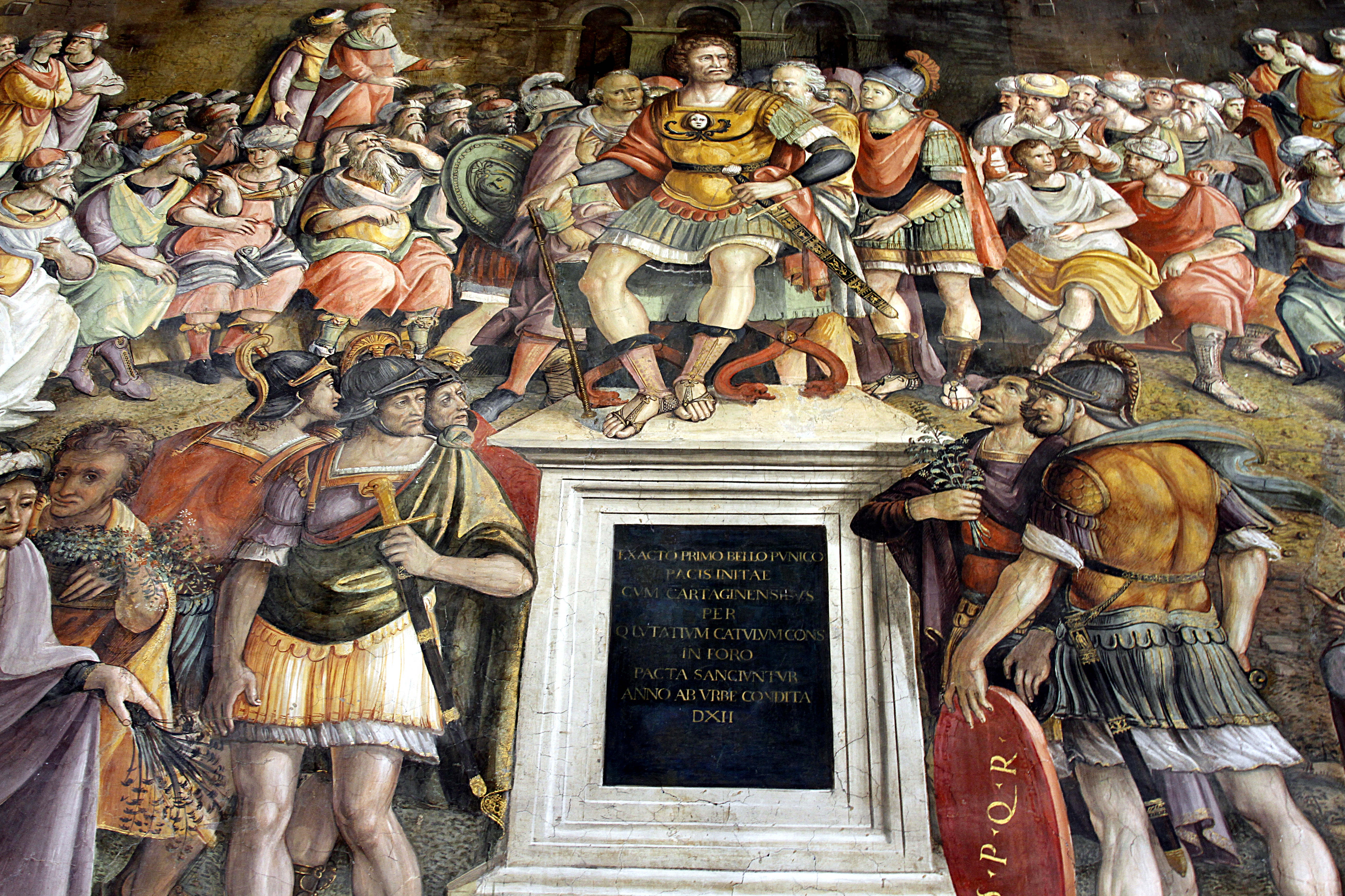 Palazzo dei Conservatori - Musei Capitolini - Rome